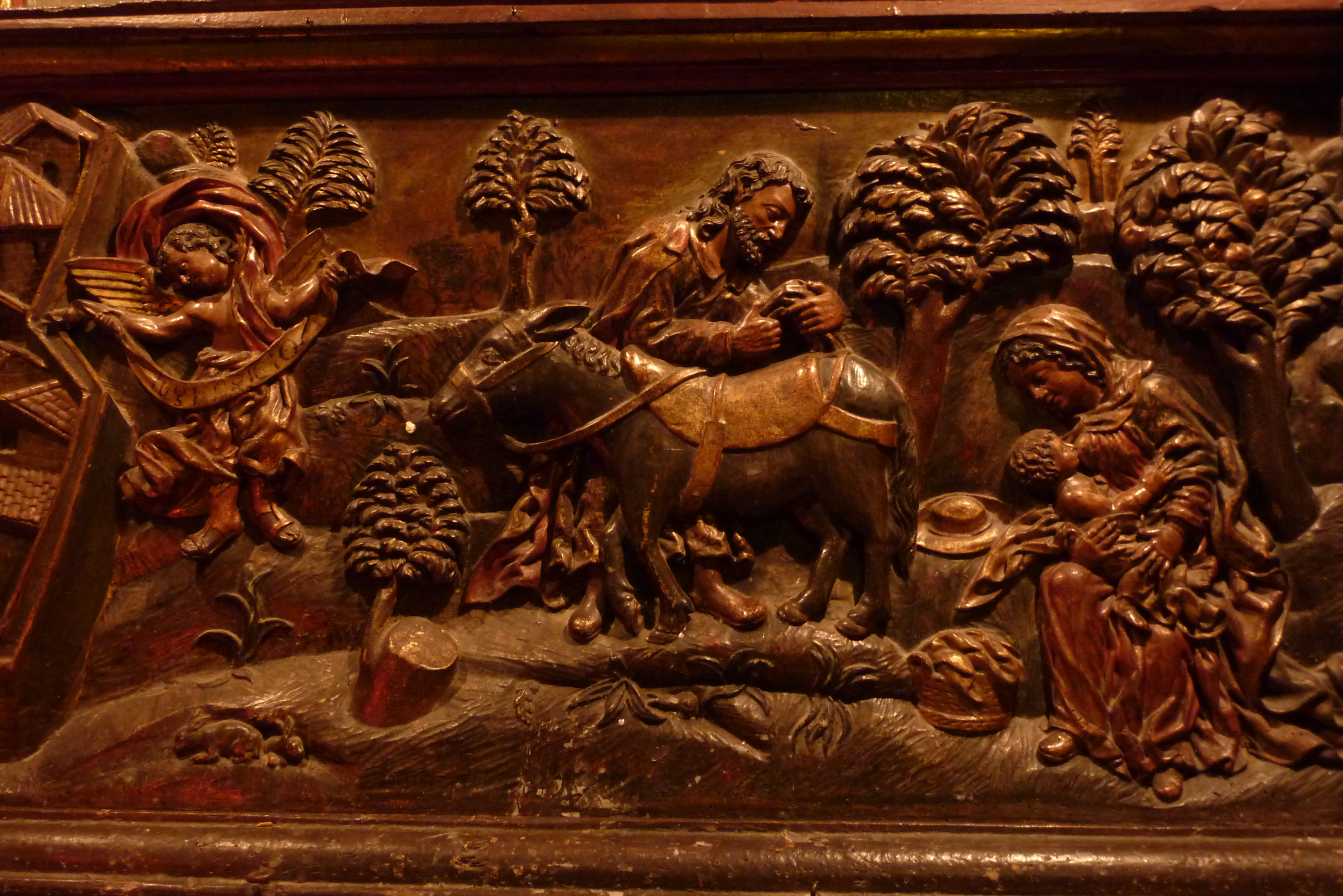 Kathedrale von Ourense, Relief mit Darstellung der Flucht der hl. Familie nach Ägypten am Marienaltar (Retablo de la Virgen de Belén)The Rest on The Flight into Egypt